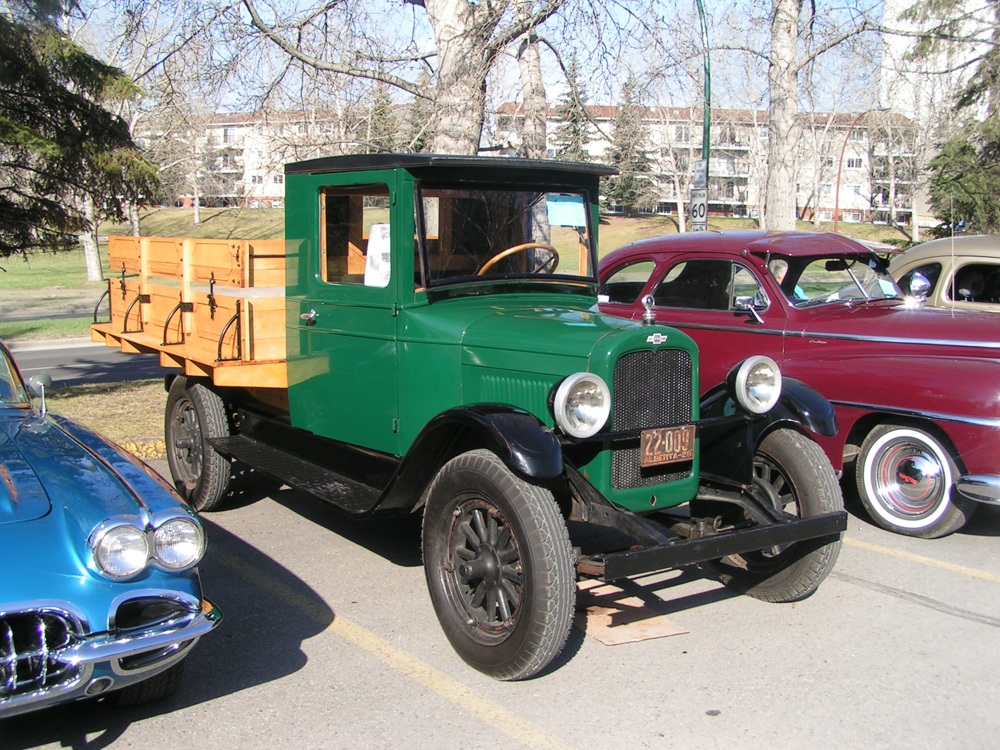 Chevrolet Truck